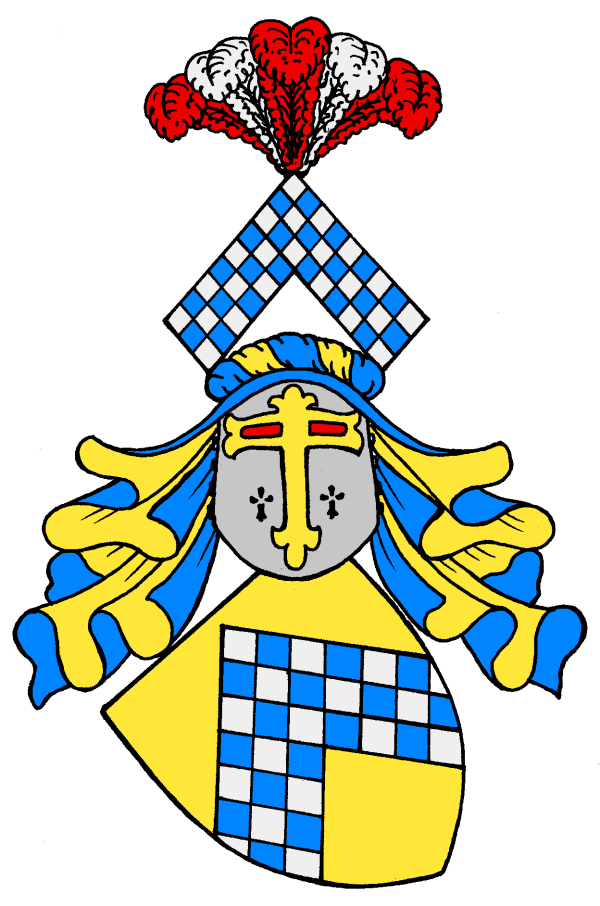 Wappen derer von Mellin.